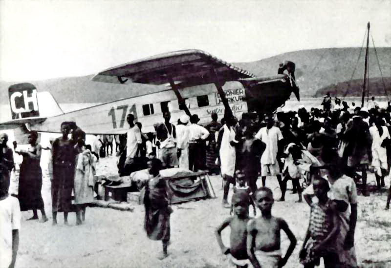 Ad Astra Aero S.A. : Dornier Merkur (CH 171) pilotted by Walter Mittelholzer in Kigocna (Kenya)